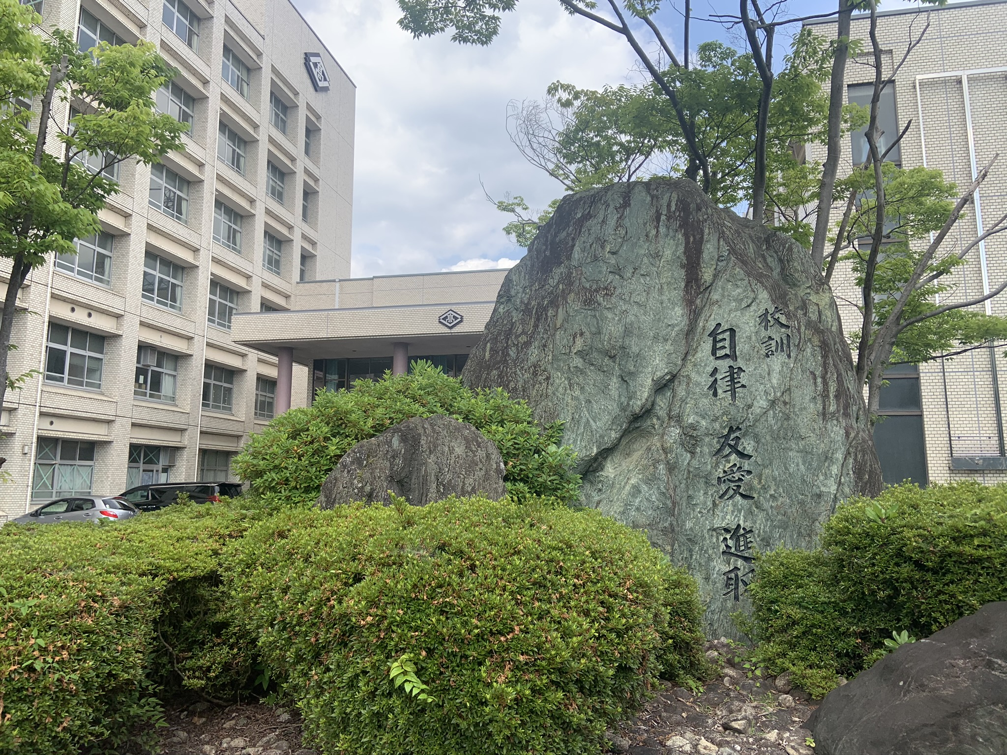 滋賀県玉川高校校訓石碑